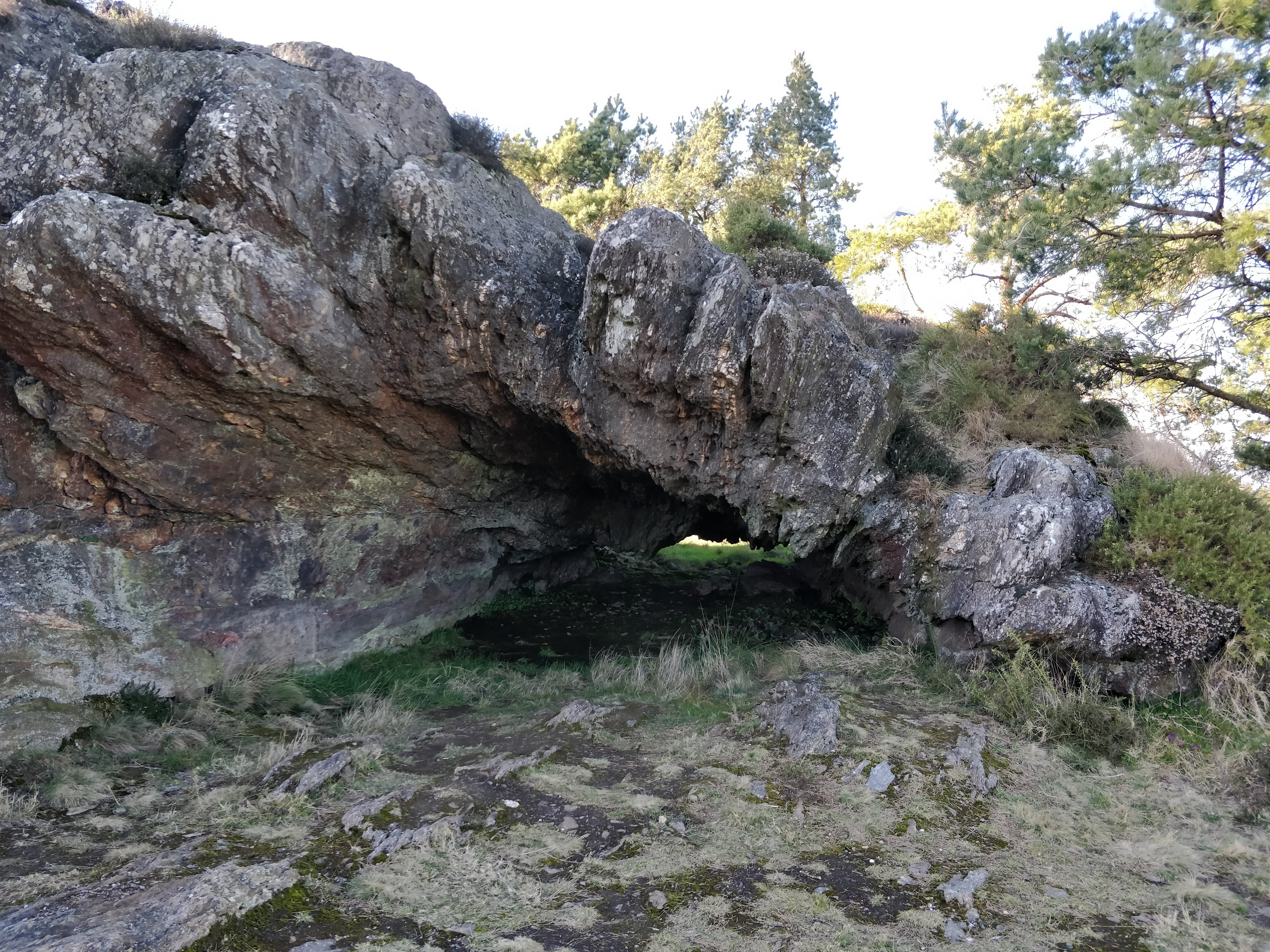 A cova da Cova da Serpe.